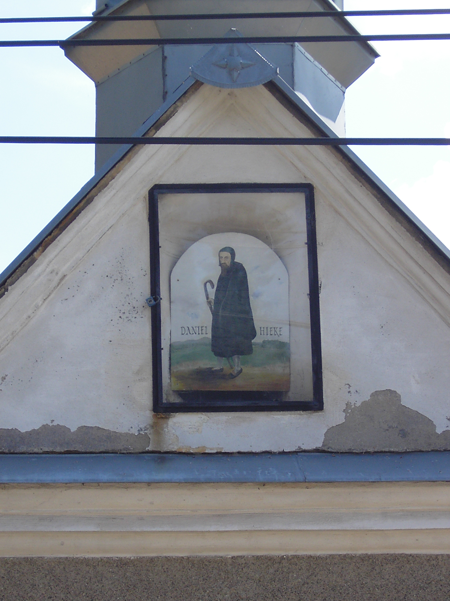 Kaple Panny Marie Pomocné v Zahradách u Krásné Lípy